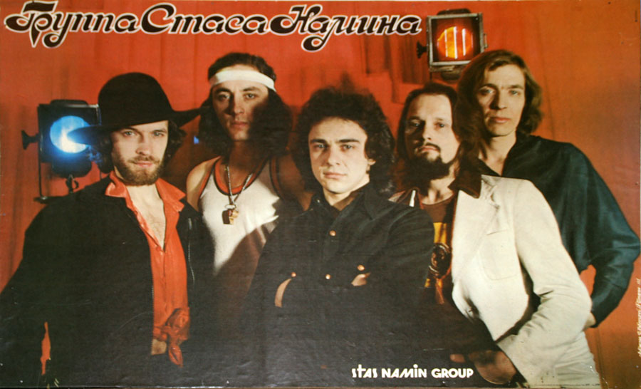 Группа Стаса Намина. Постер 1981 год. Слева направо: В.Васильев, М.Файнзильберг, И.Саруханов, А.Слизунов, А.Лосев.